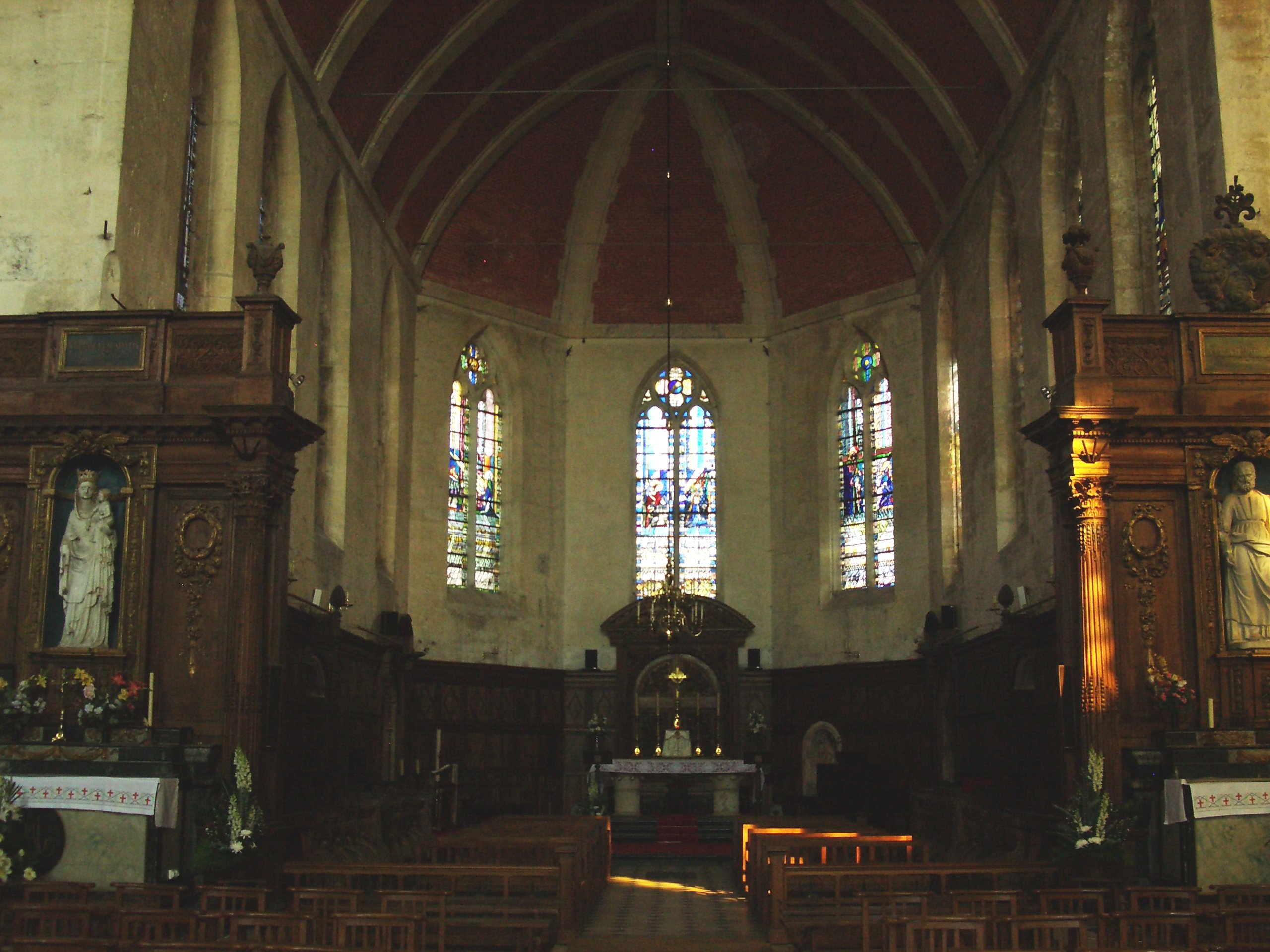 Collégiale d'Écouis - Le choeur